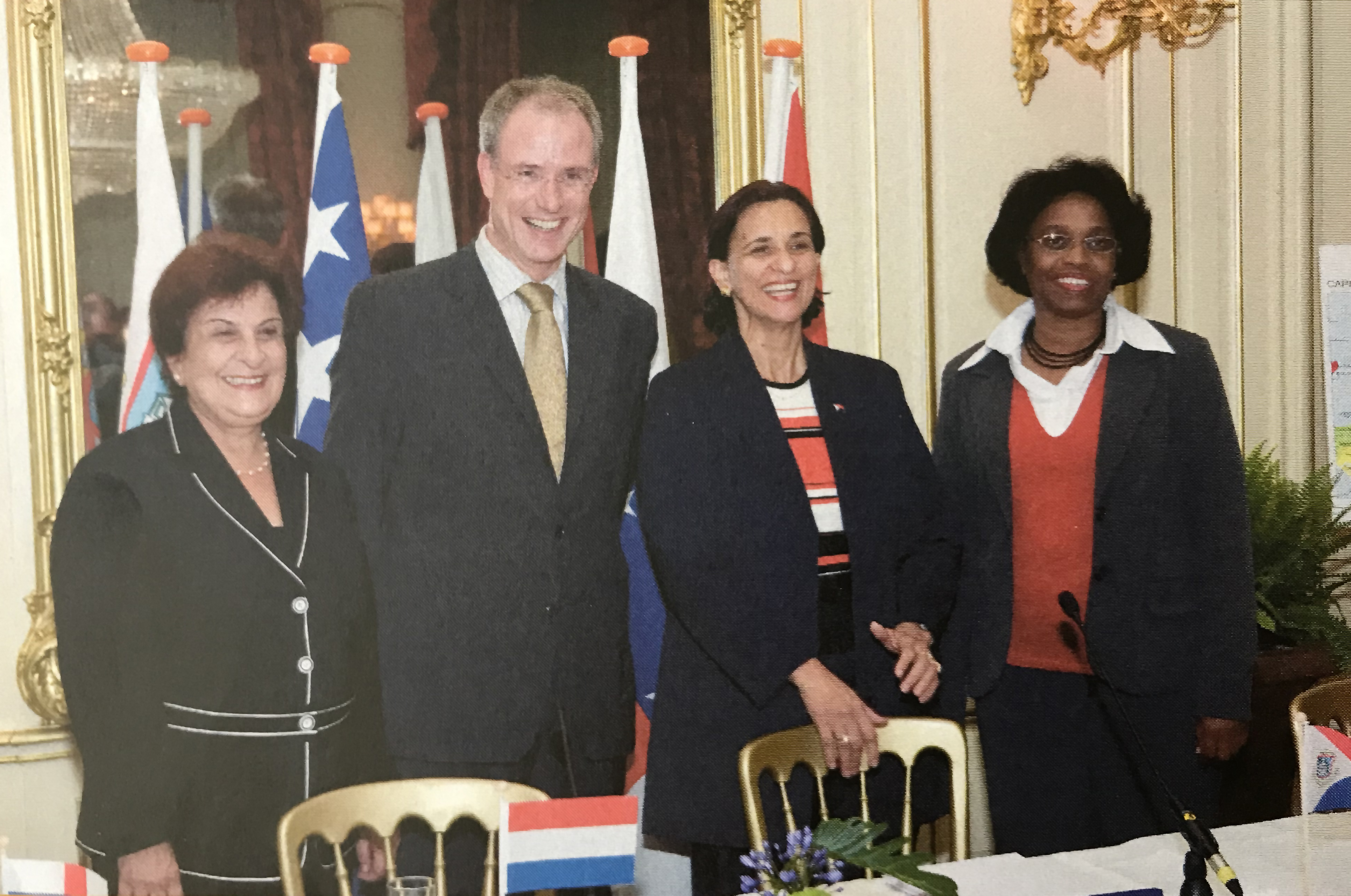 Hoofdonderhandelaars van het historisch akkoord over staatkundige hervorming van de Nederlandse Antillen, bij het bereiken van de deal in de Spaanse Hof te Den Haag, november 2006. Vlnr: Emily de Jongh-Elhage, Atzo Nicolai, Sarah Wescot-Williams en Zita Jesus-Leito